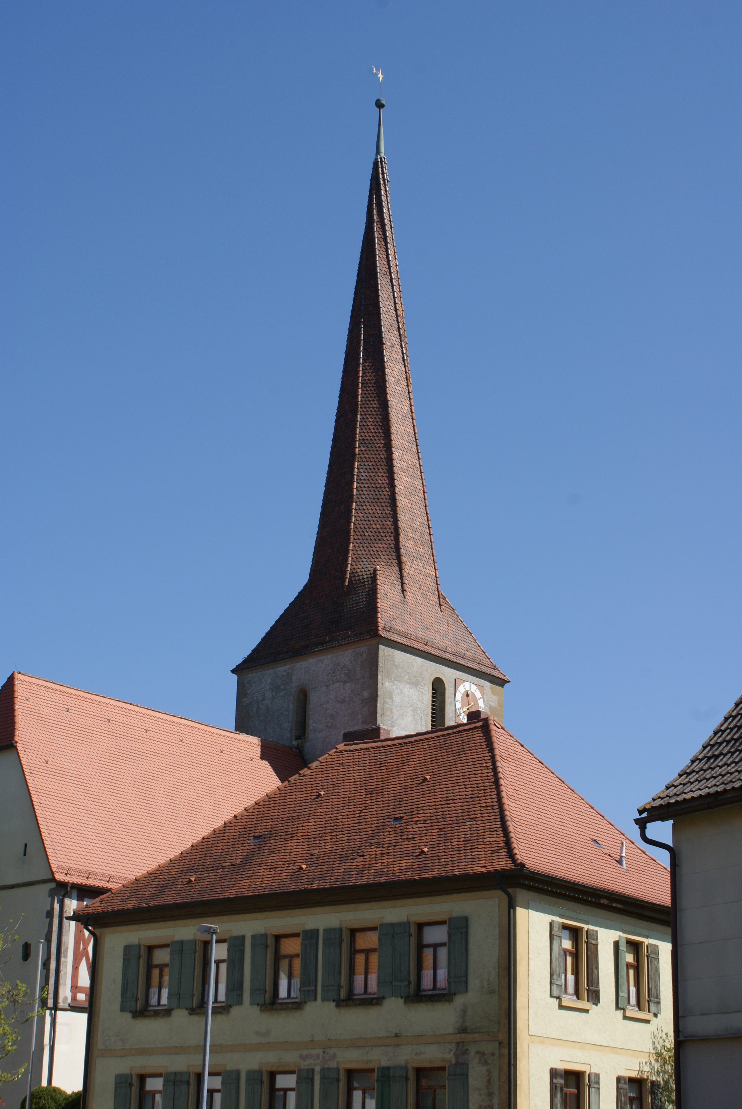 Die Peter-und-Paulskirche in Wettringen in Bavaria.